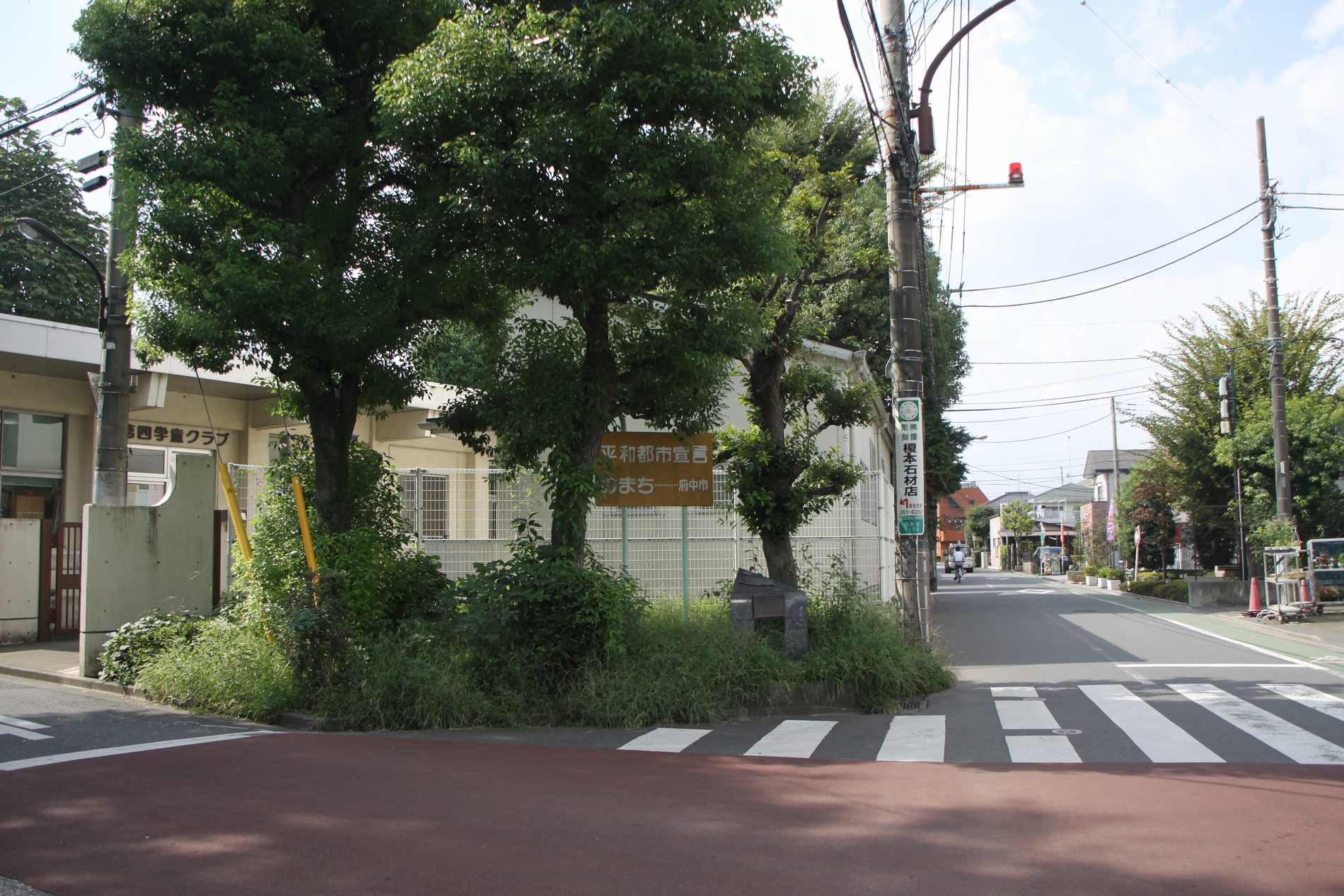 多磨村役場跡